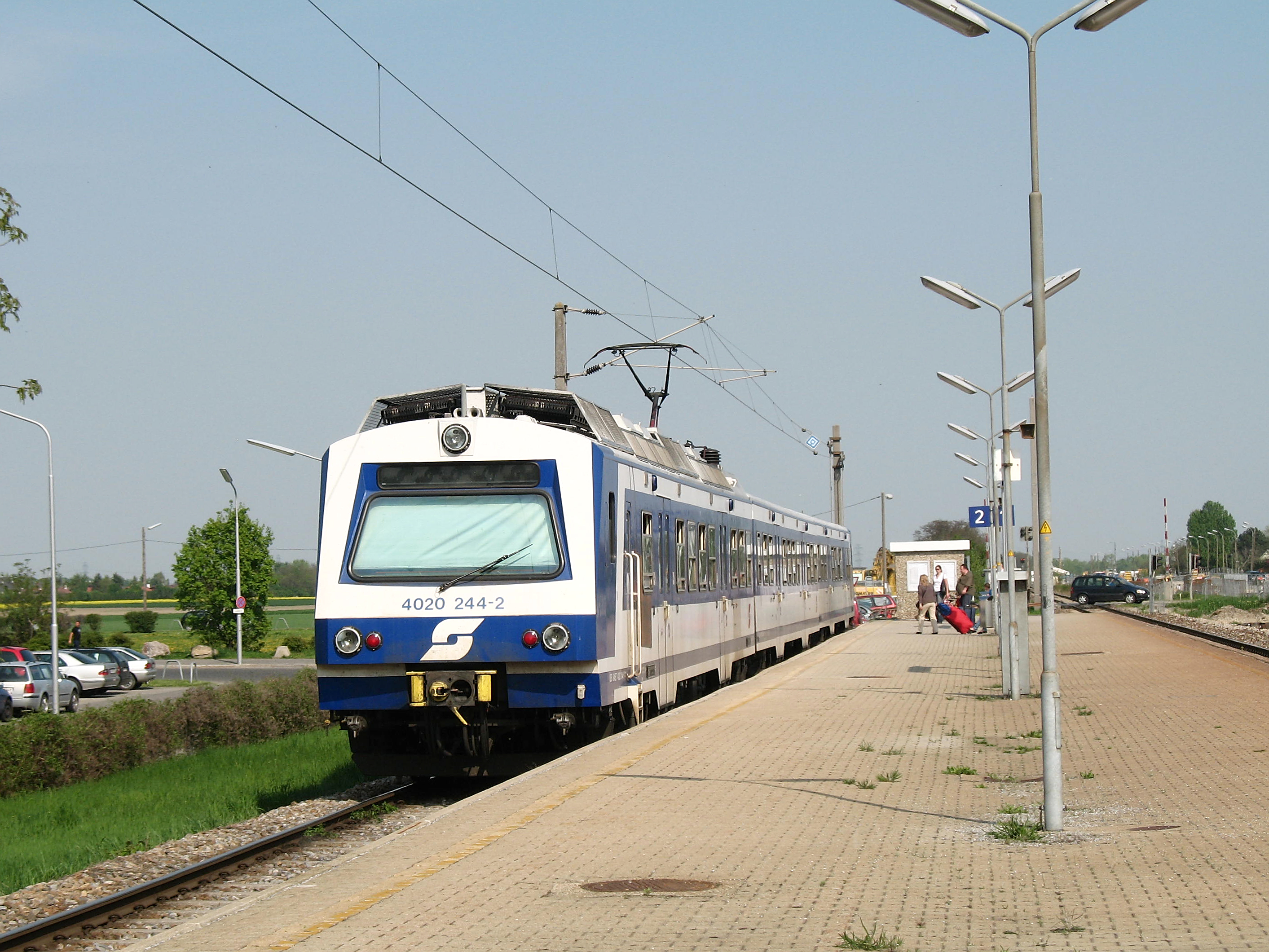 Trajno de la tipo 4020 de la S-Bahn de Vieno, linio S80, en la tiama fina haltejo Wien Hausfeldstraße.